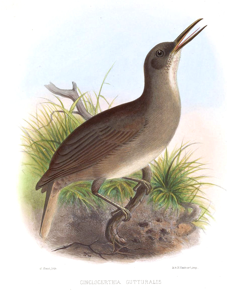 Cinclocerthia gutturalis